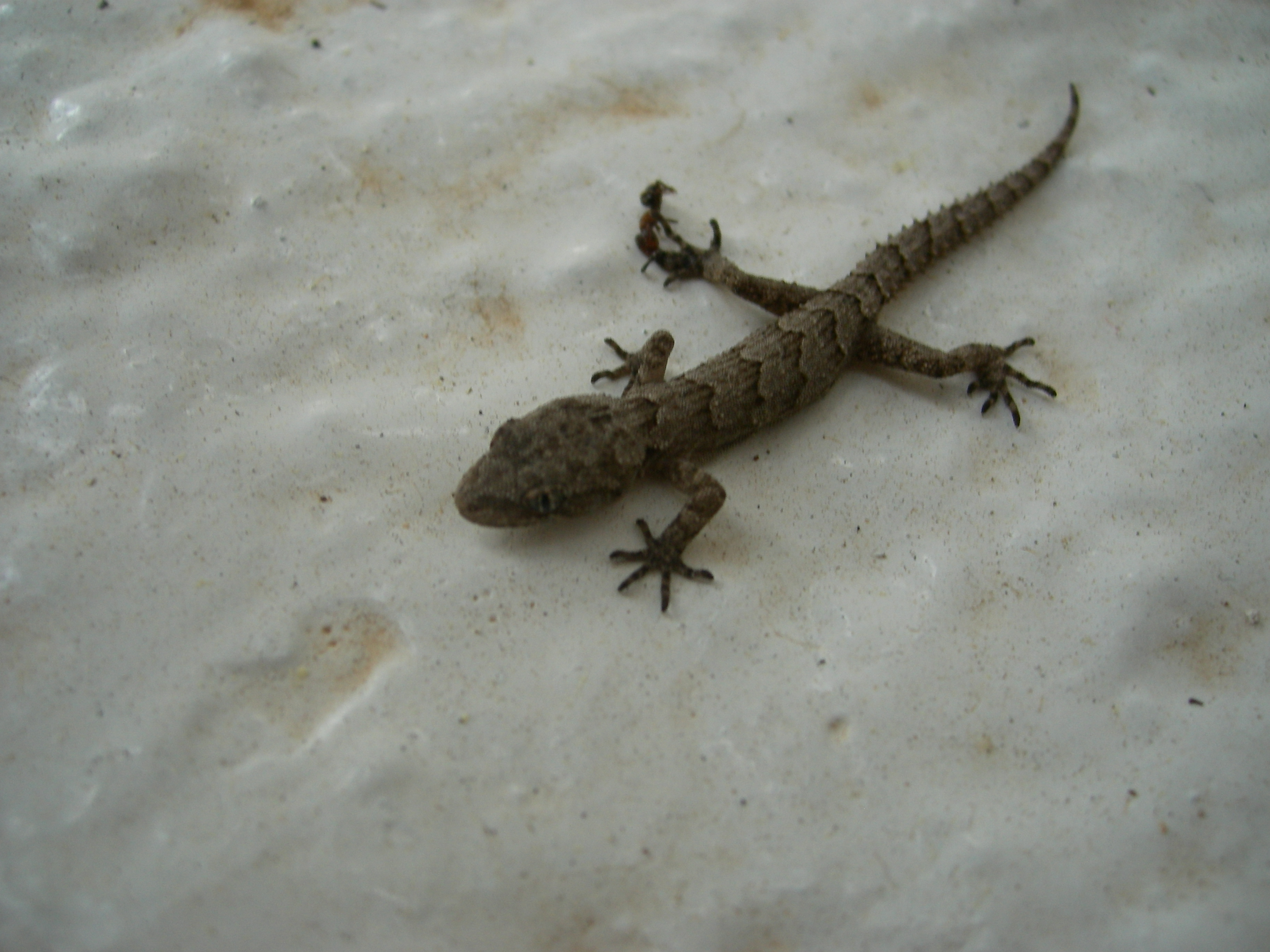 Yayladağı'ndan çeşitli görüntüler